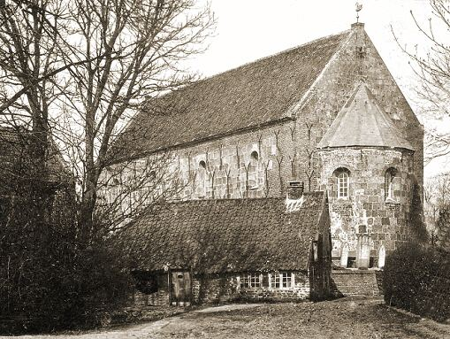 Kirche von Minsen etwa um 1900, das kleine Küsterhaus davor existiert heute nicht mehr.